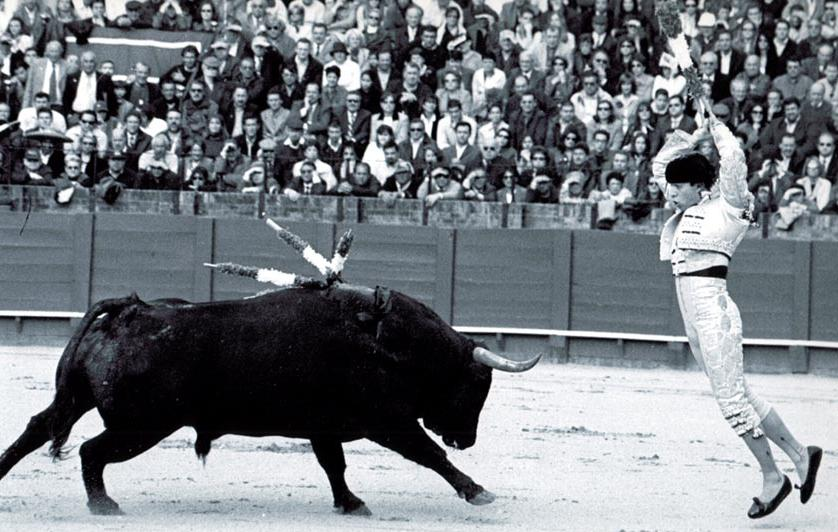 El banderillero sevillano Curro Molina, poniendo un par de banderillas en la Maestranza de Sevilla